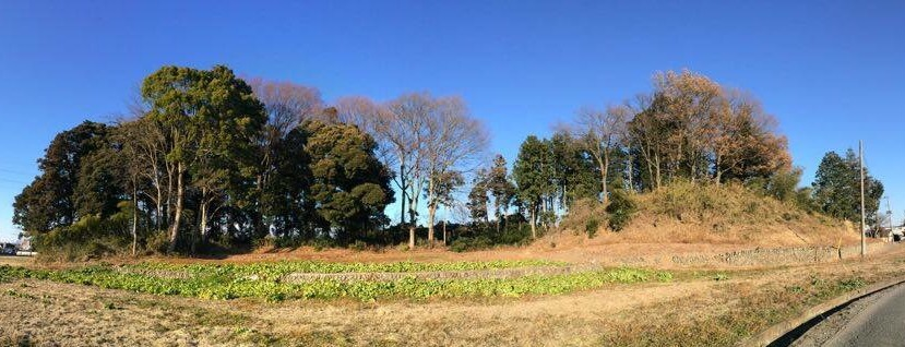 藤本観音山古墳